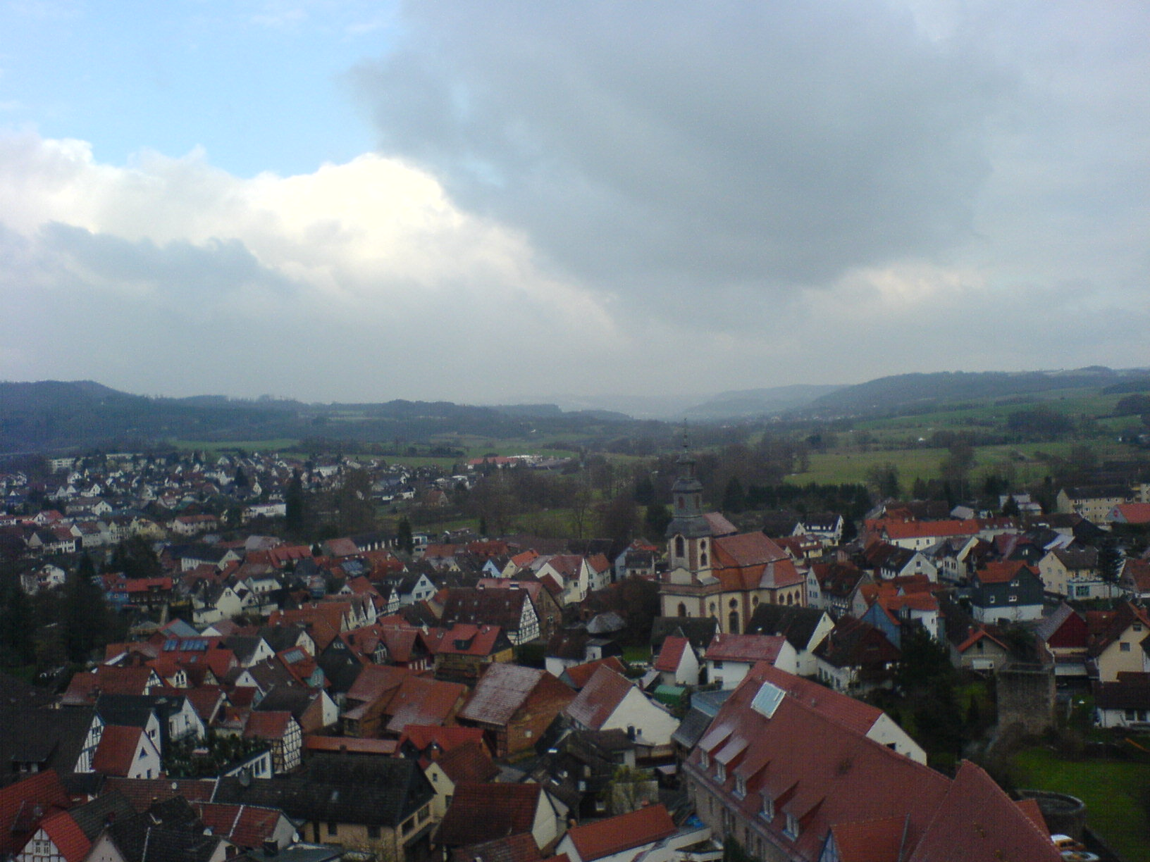 Steinau an der Straße (Main-Kinzig-Kreis, Hessen) - Sicht zur Bellinger Warte vom Burgfriedturm gesehen.